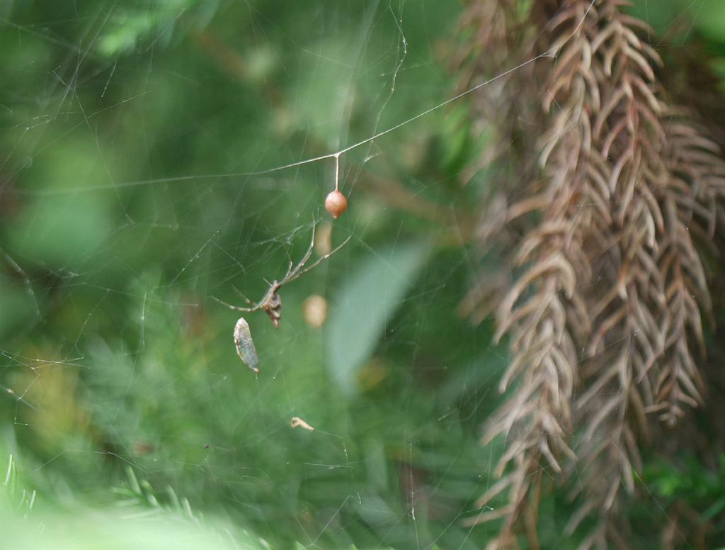 Argyrodes kumadai：チリイソウロウグモ・卵嚢と雌 2012/08/08 和歌山県田辺市：Tanabe City. Wakayama Pref. Japan